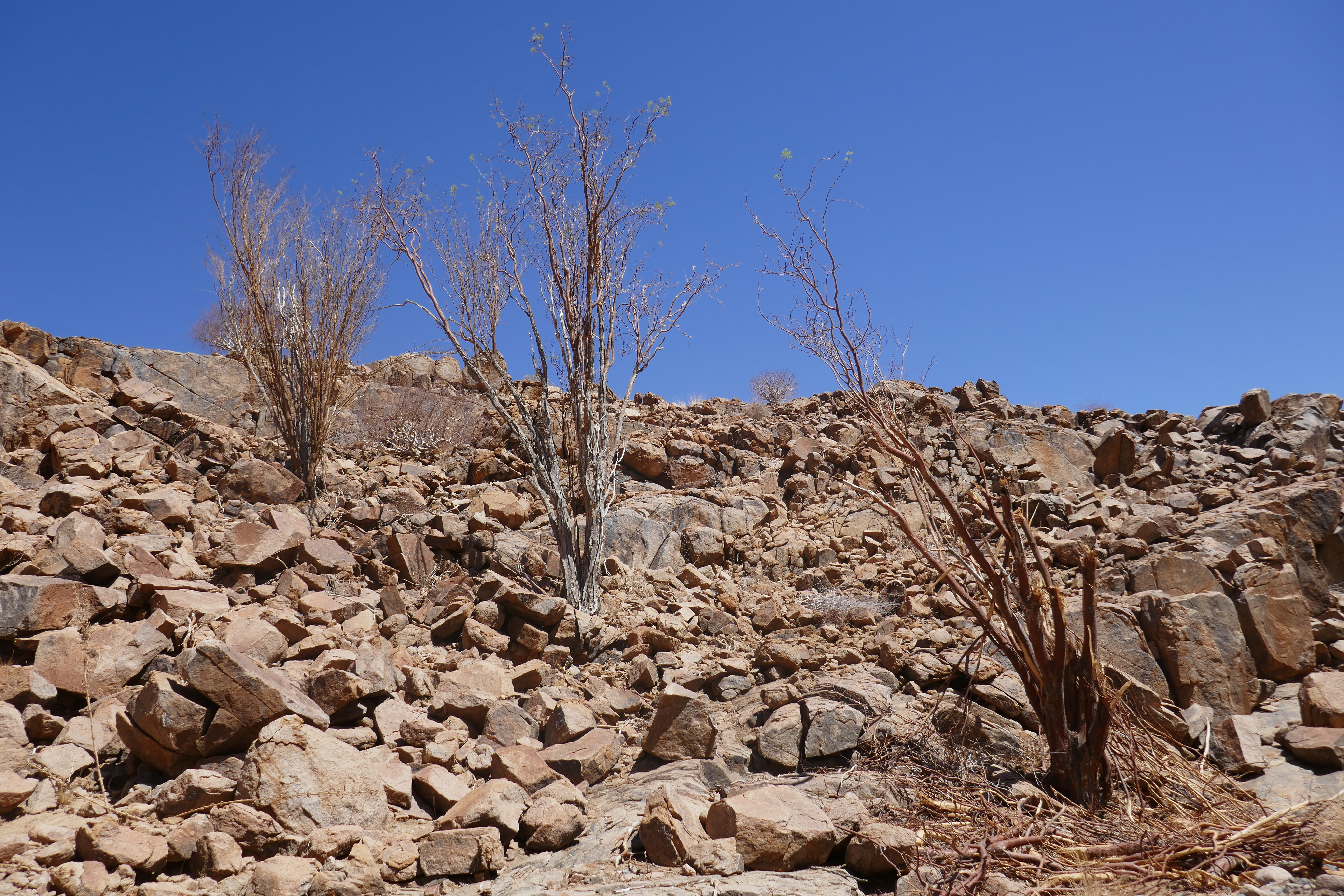 Acacia montis-usti dans le massif du Brandberg en Namibie. Plante endémique.